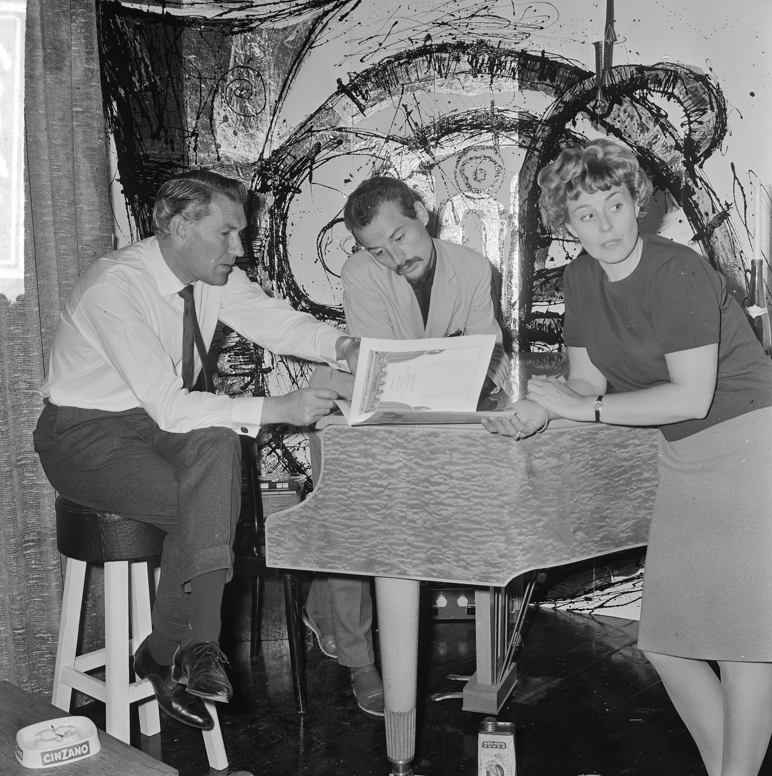 Nieuw cabaret in Rotterdam, het echtpaar Steye en Ansje van Brandenberg en pianist Rob van de Linden